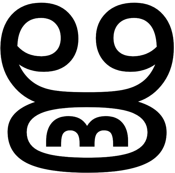 ൠ അക്ഷരം